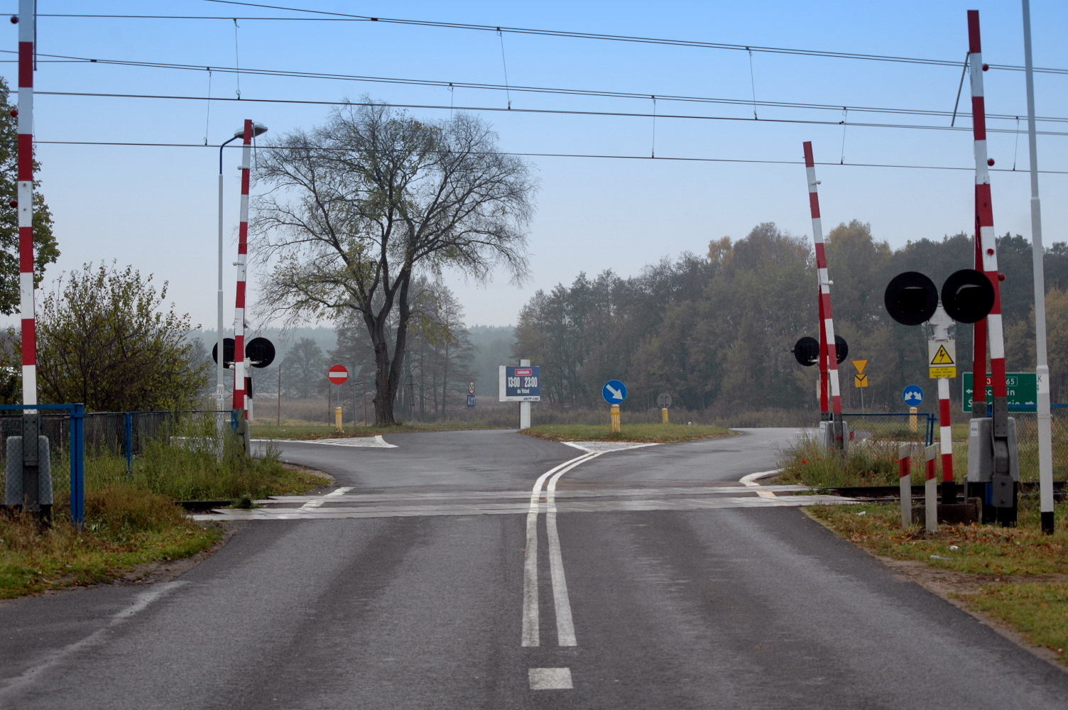 Droga wojewódzka nr 107 przecinająca linię kolejową nr 401 w Parłówku.